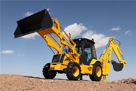 بکهولودر سنوپارس